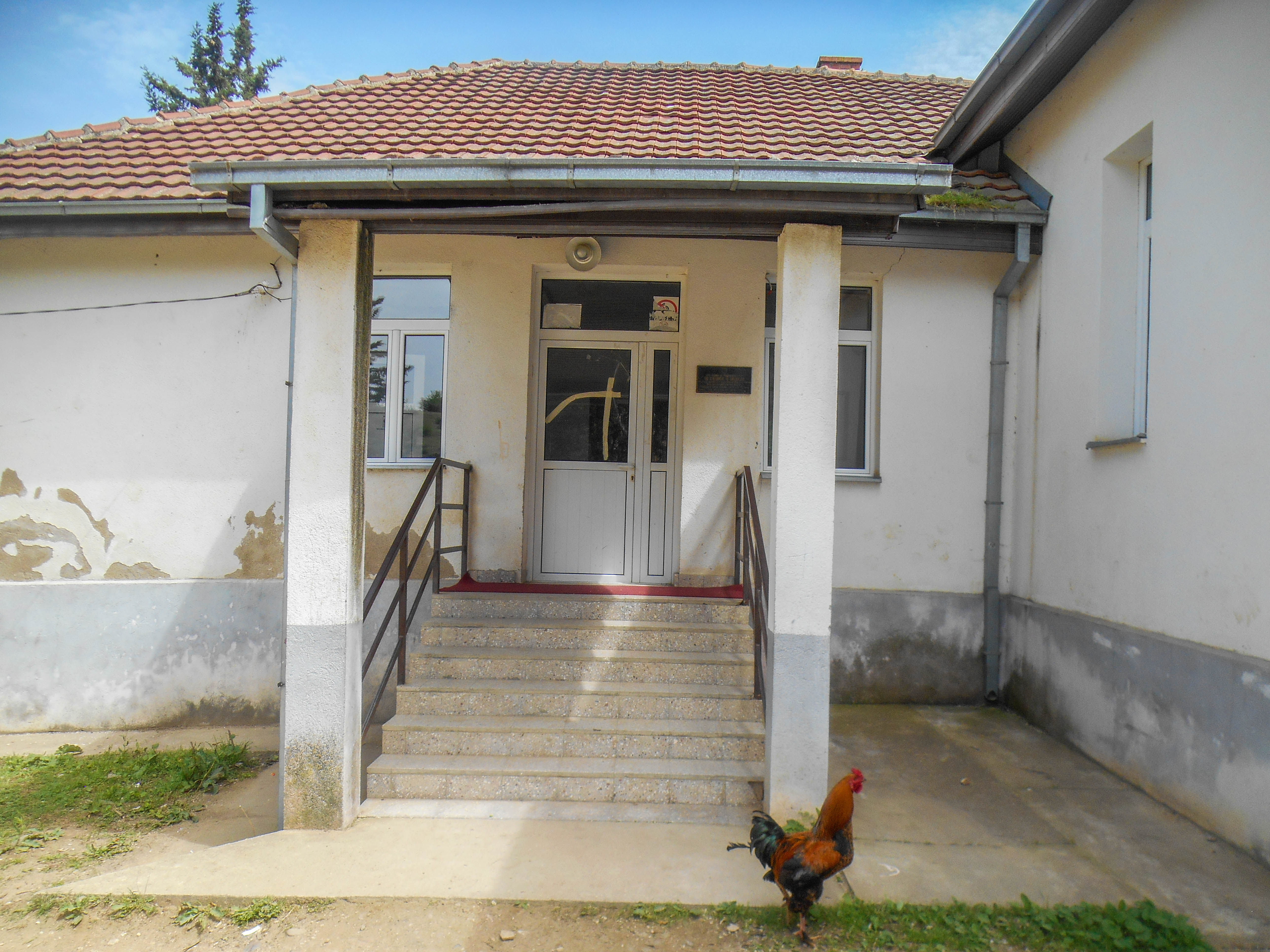 Основно училиште „Гоце Делчев“ - Дукатино